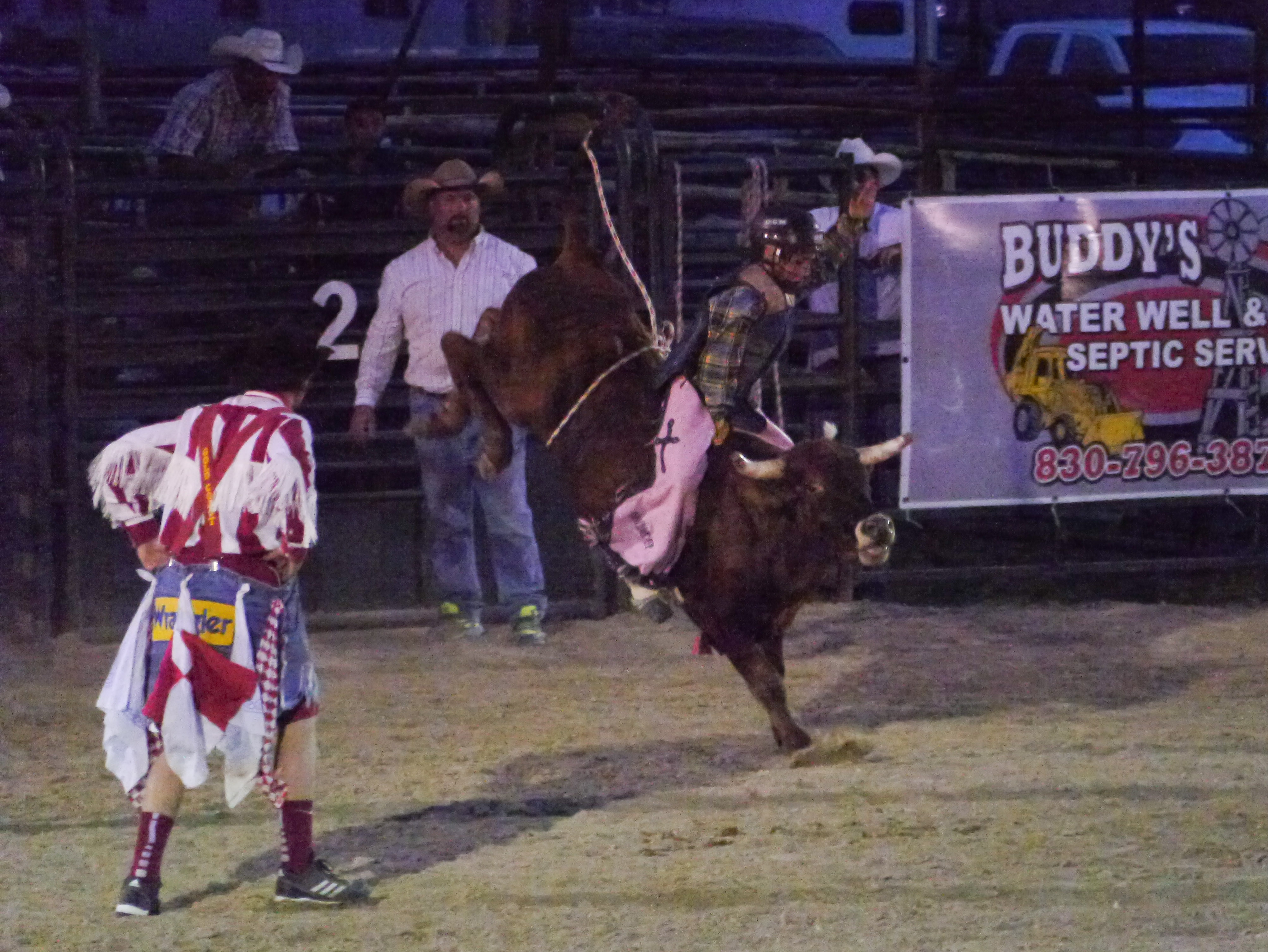 Rodeo, Texas, USA